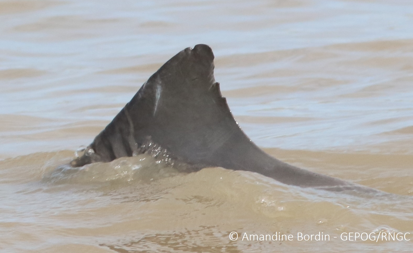 Aileron marqué